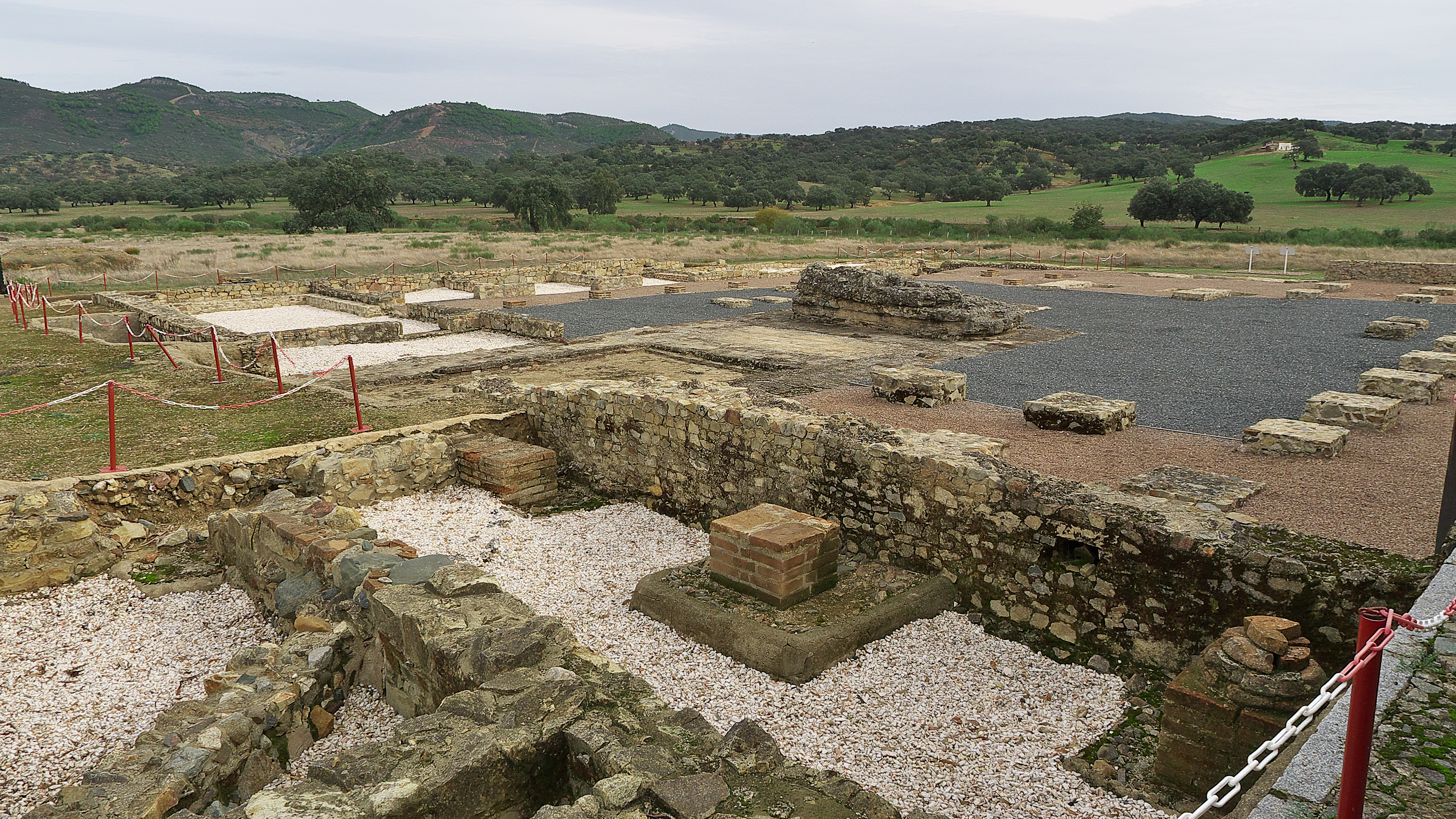 Ciudad hispano romana de la Baeturia Céltica